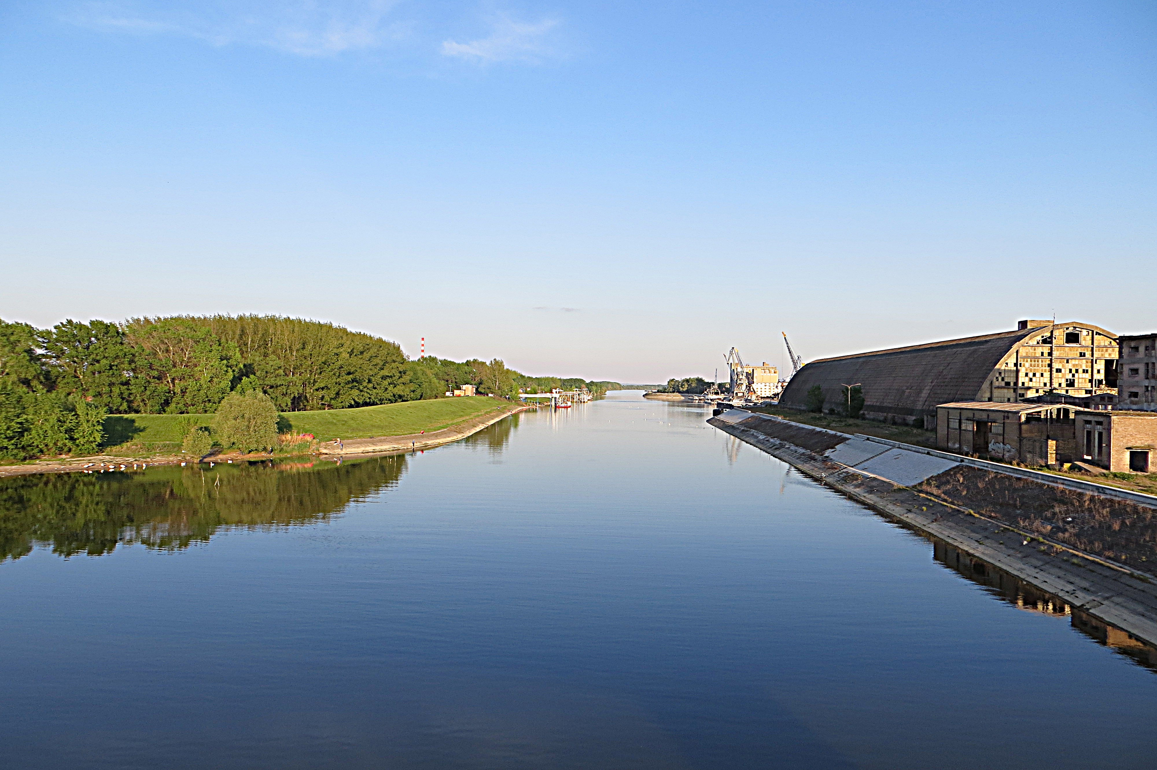 Kanal DTD